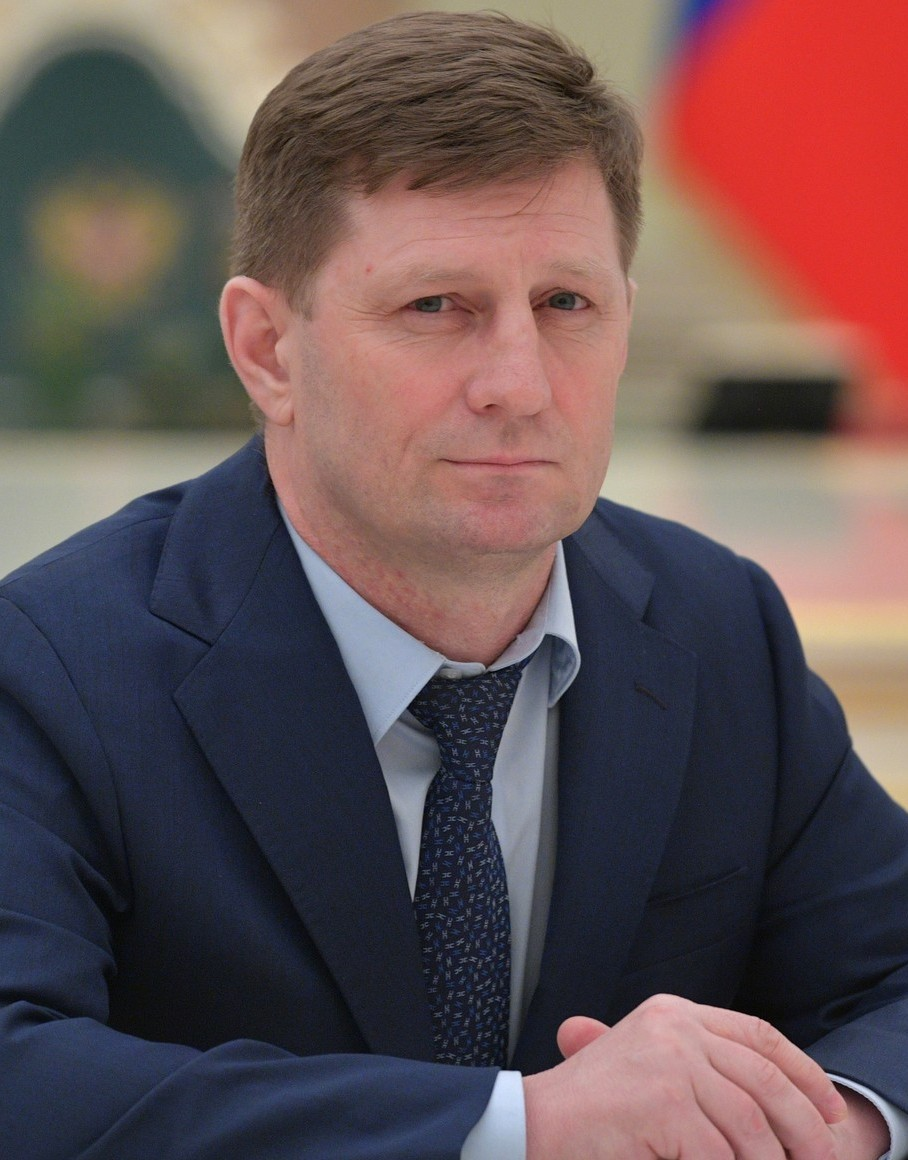 Губернатор Хабаровского края Сергей Фургал во время встречи с Президентом России Владимиром Путиным